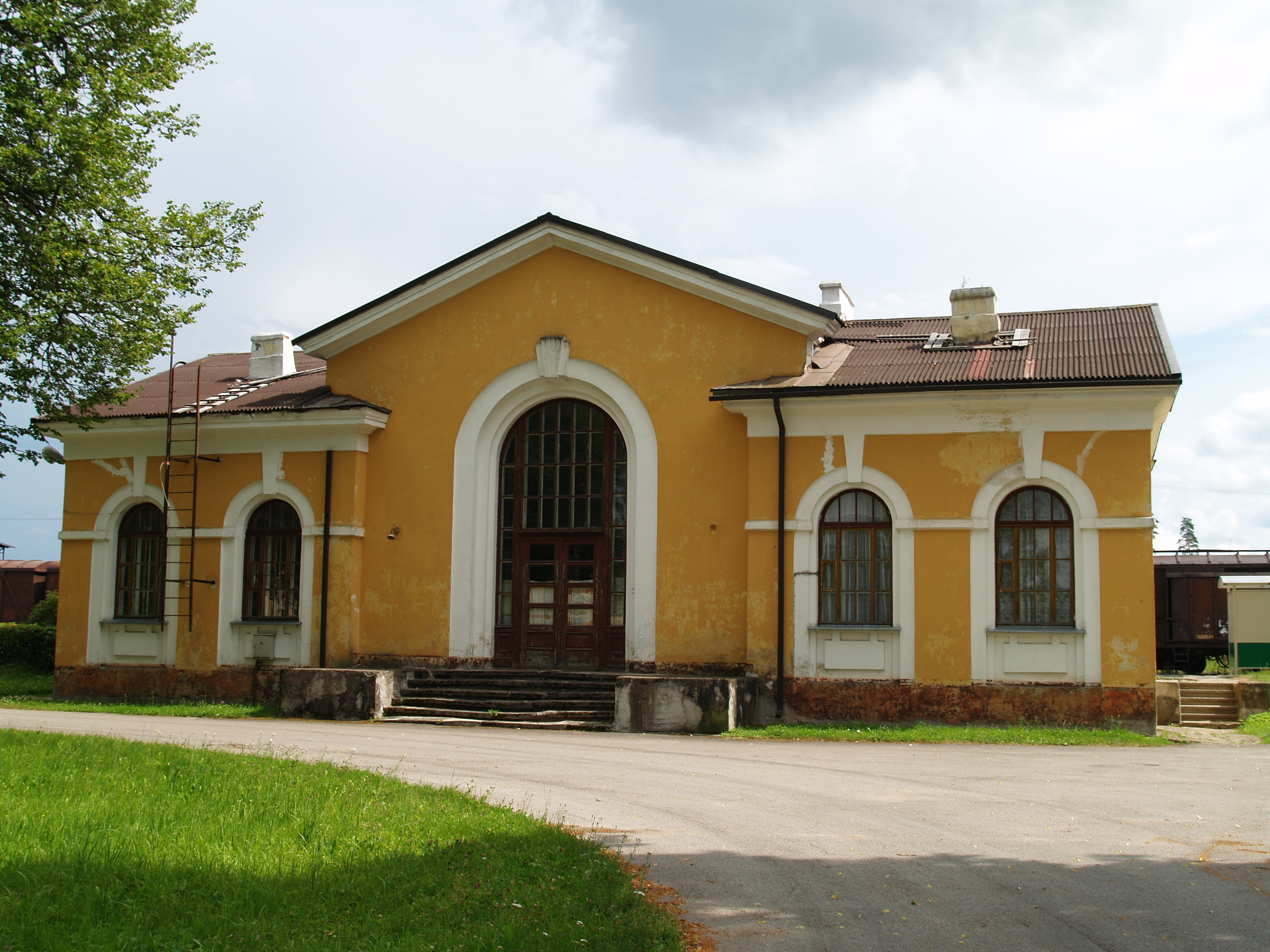 Ieriķi raudteejaam Valga–Riia raudteeliini